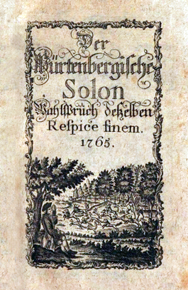 Titel von Der Würtenbergische Solon: Wahlspruch desselben: Respice finem. Erschienen 1765.